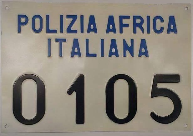 Targa posteriore per vetture ed autocarri della PAI del primo tipo (scritta integrale in blu, caratteri neri)